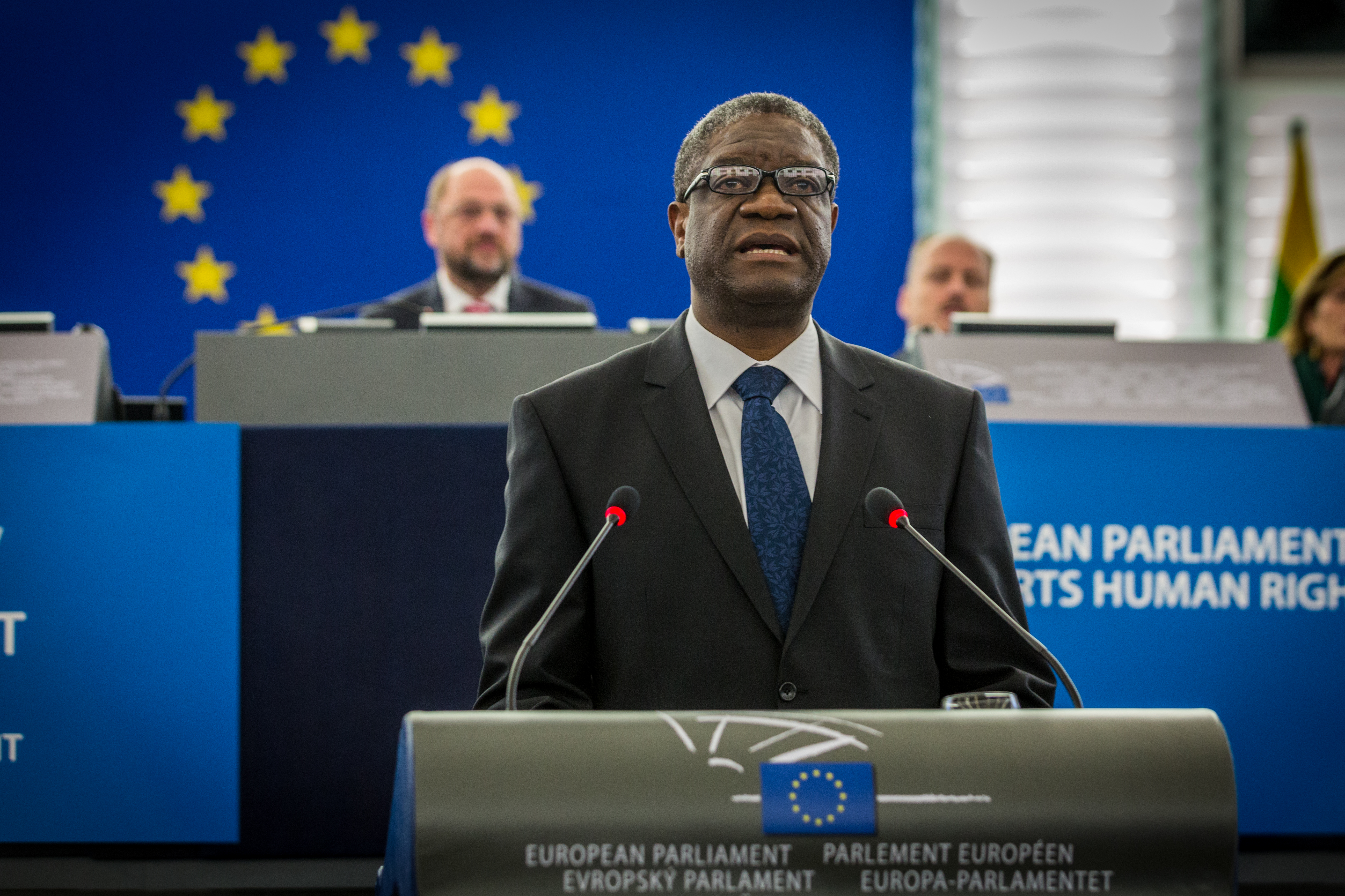 Remise du prix Sakharov 2014 à Denis Mukwege au Parlement européen, Strasbourg 26 novembre 2014